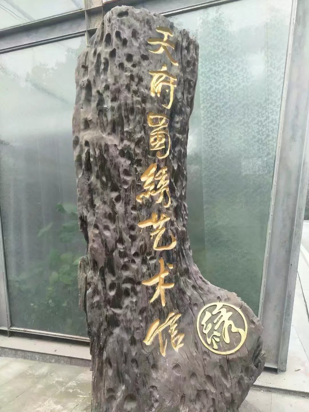 中文（中国大陆）: 成都天府蜀绣艺术馆